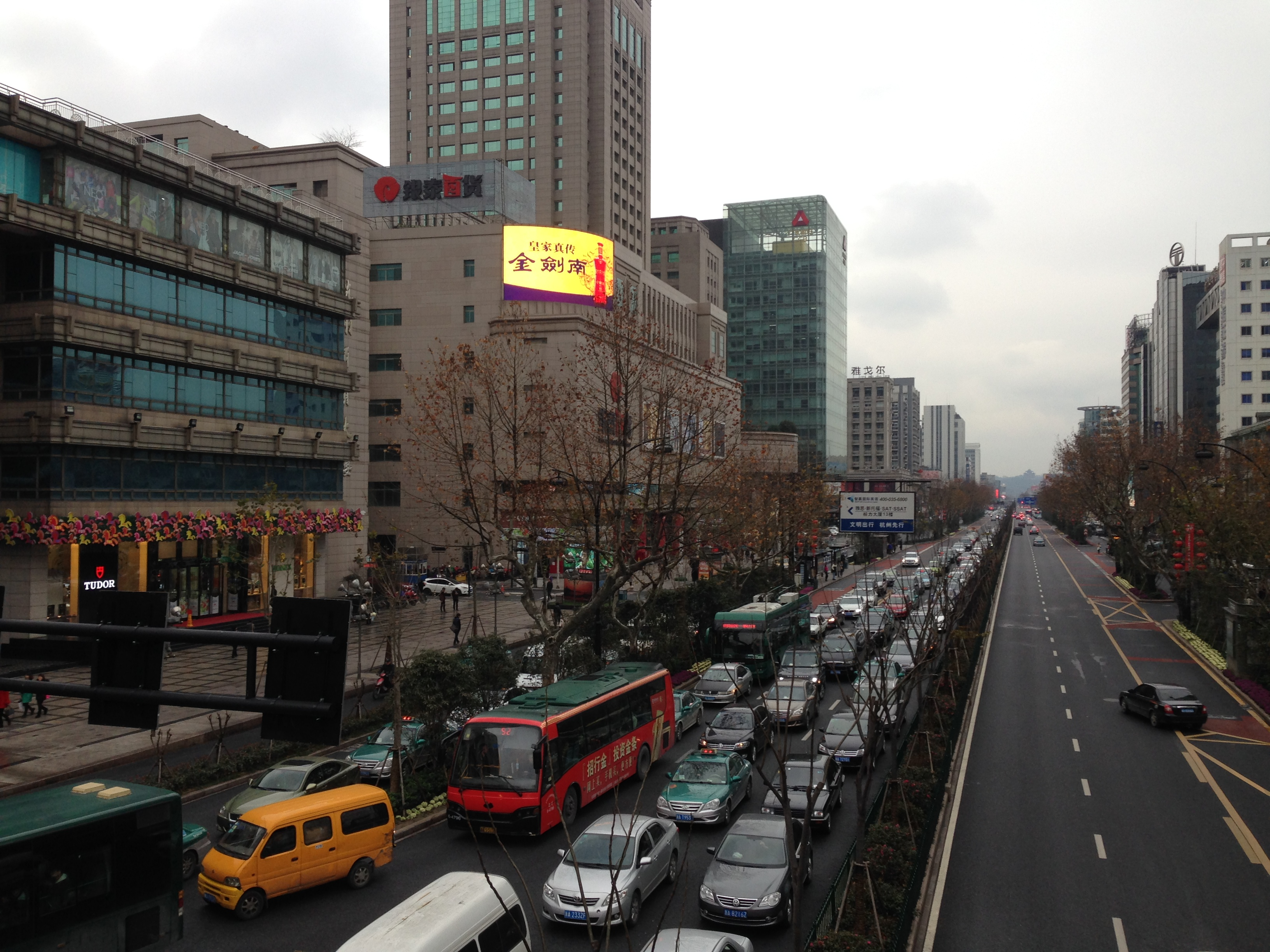 Hangzhou, China